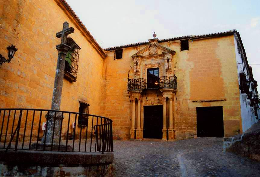 Palacio de los Marqueses de Salvatierra